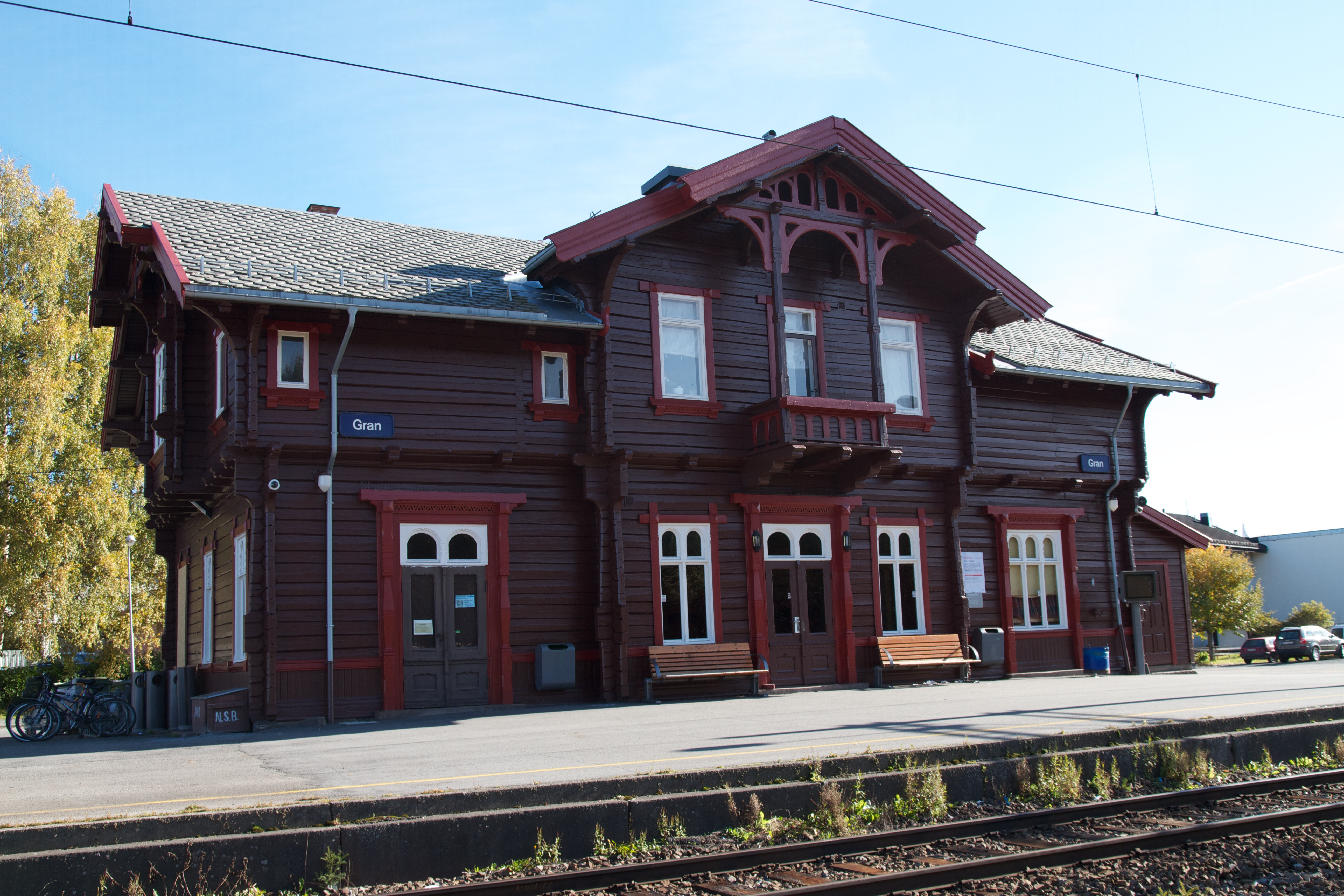 Gran stasjon i Oppland.